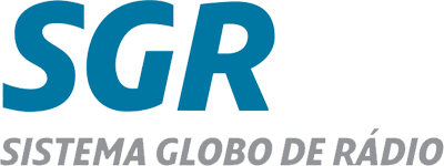 Logotipo do Sistema Globo de Rádio, conjunto de emissoras de rádio pertencentes ao Grupo Globo